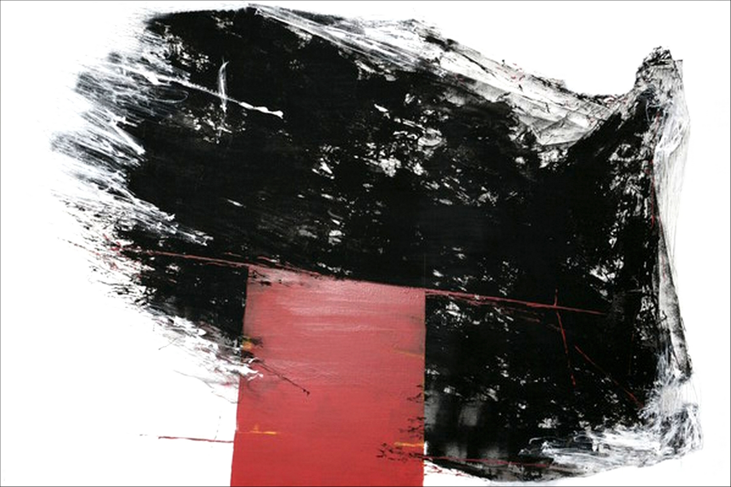 Pierre Saint-Paul (2005), 130 x 195, huile sur toile